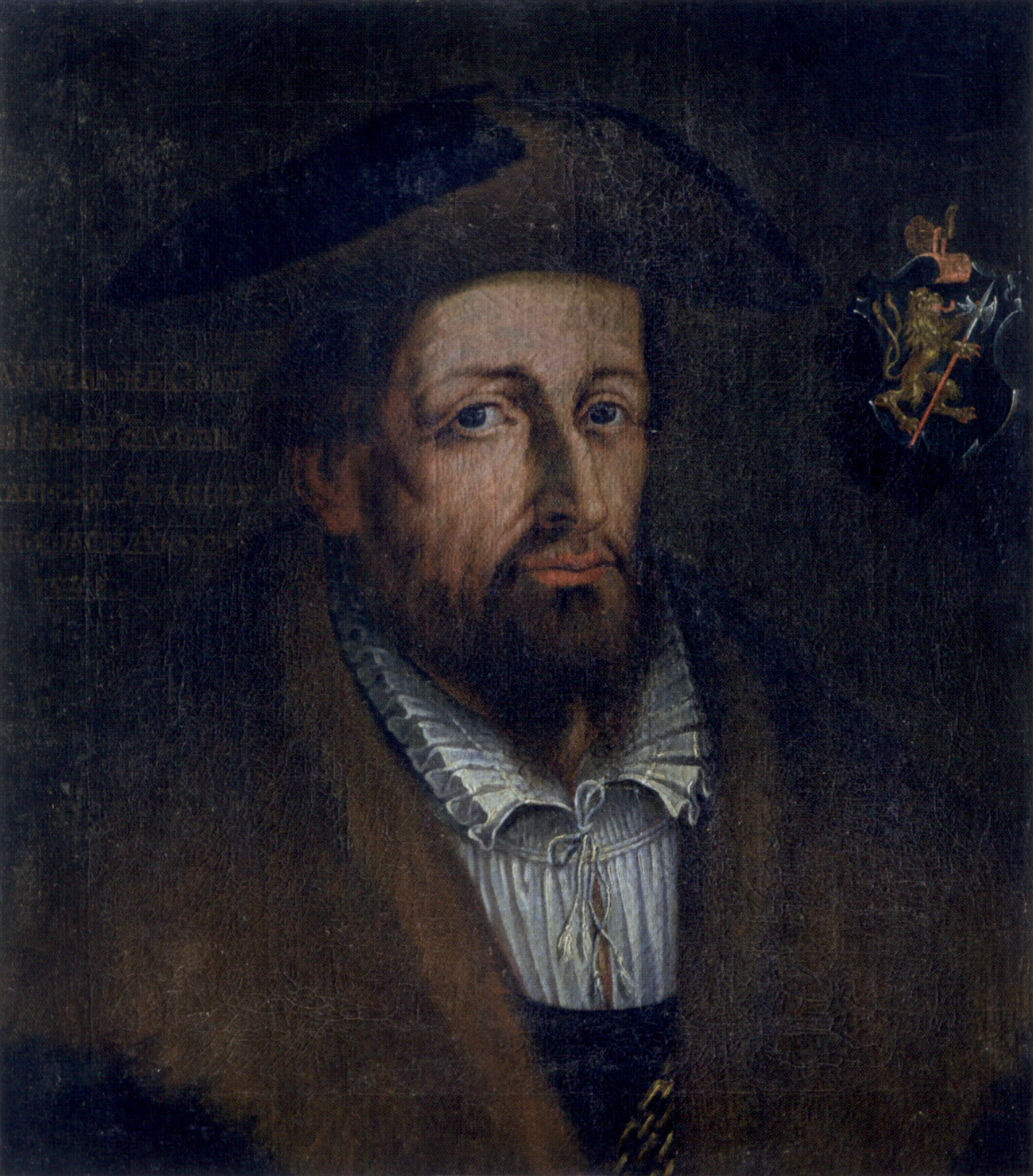 Portrait Johann Werners von Zimmern d. J. (1480–1548), unbekannter Künstler, wohl 17. Jahrhundert nach älterer Vorlage (Halskrause und Kopfbedeckung wohl spätere Änderung); Fürstlich Fürstenbergische Sammlungen, Schloss Heiligenberg